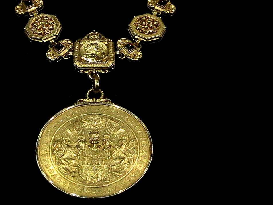 Řetěz primátora hl. m. Prahy z roku 1897, detail.